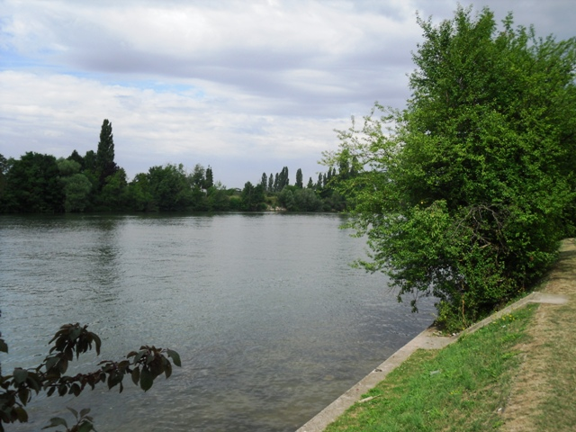 La Seine à Draveil (91)